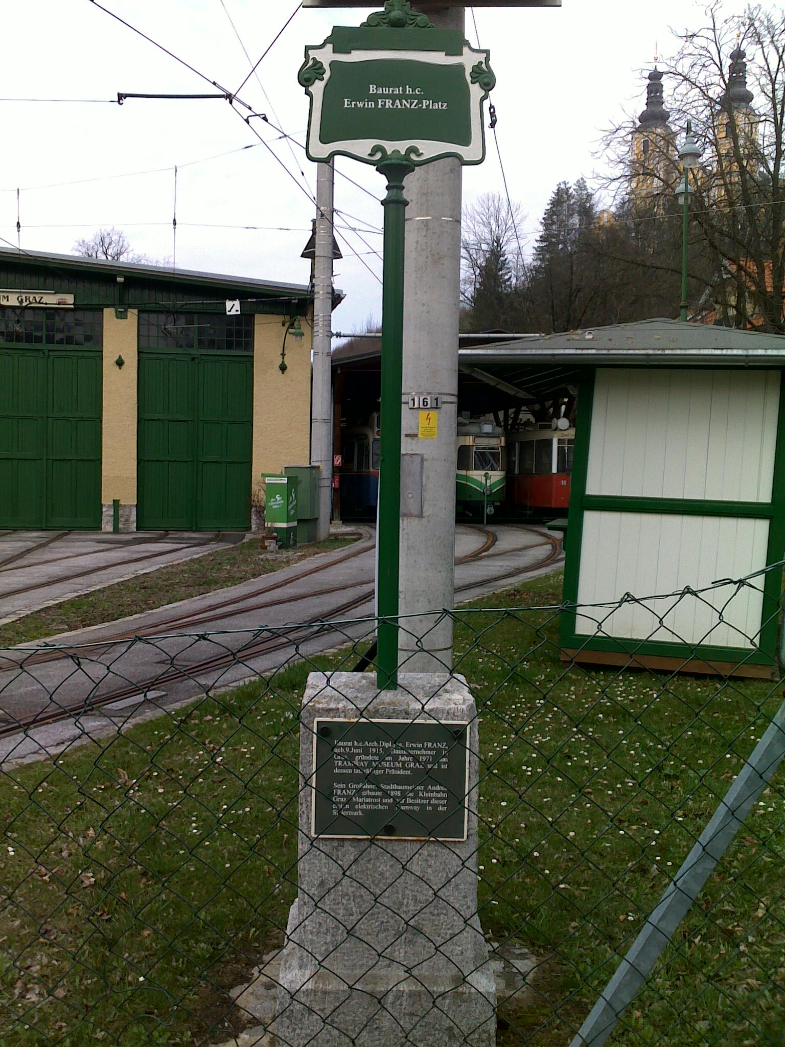 Denkmal vor dem Tramway Museum Graz